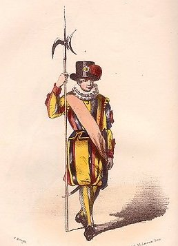 Swiss Guard c. 1850 (Suisse en petit uniforme) taken from the book Costumes de la cour de Rome, Deuxième édition / Lith. A.L. Lavoisier, Paris. Ancienne maison Silvestre, Paris 1852, plate 43 drawing by G. Perugini [1]